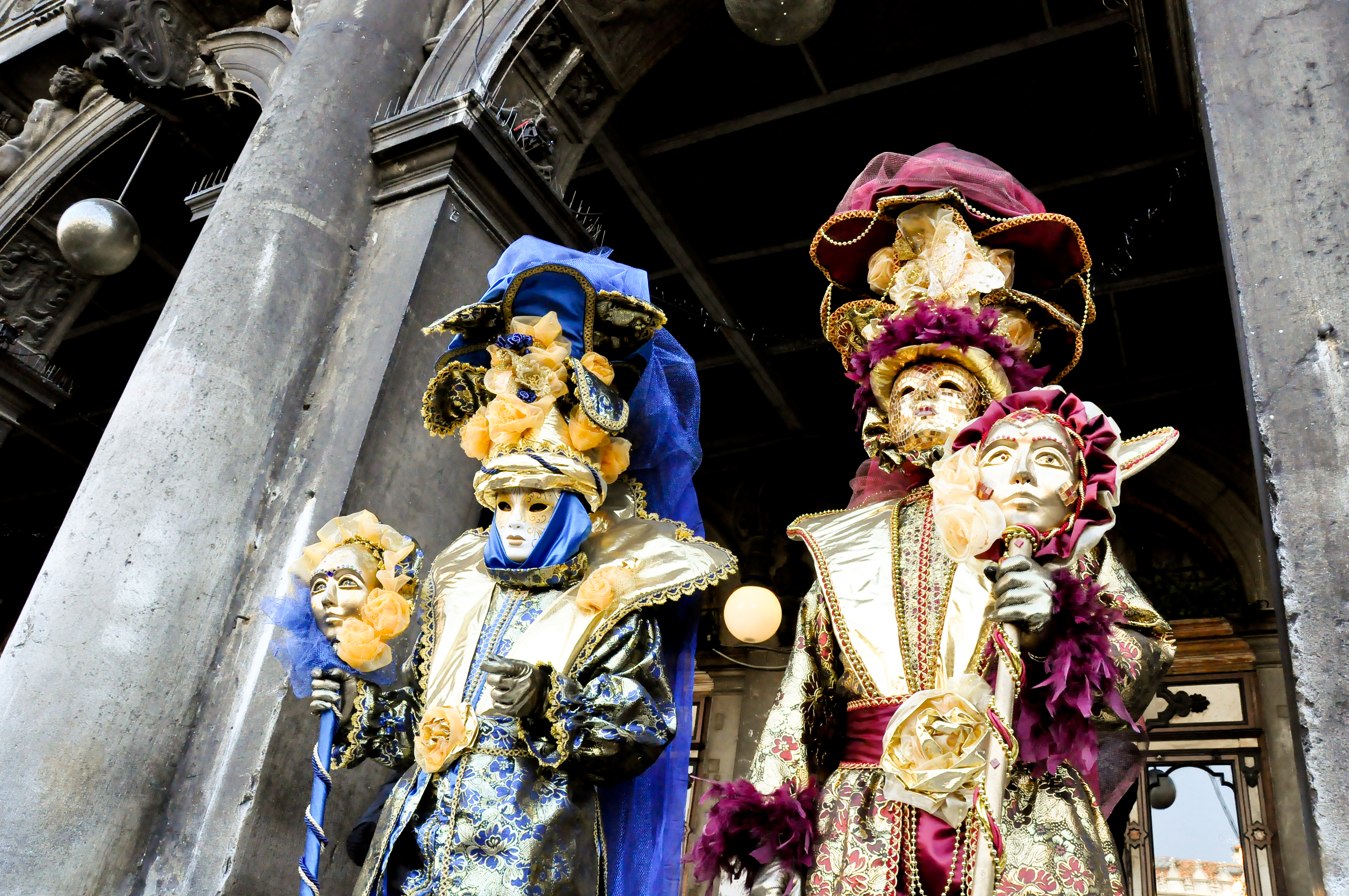 Carnevale di Venezia - 2010